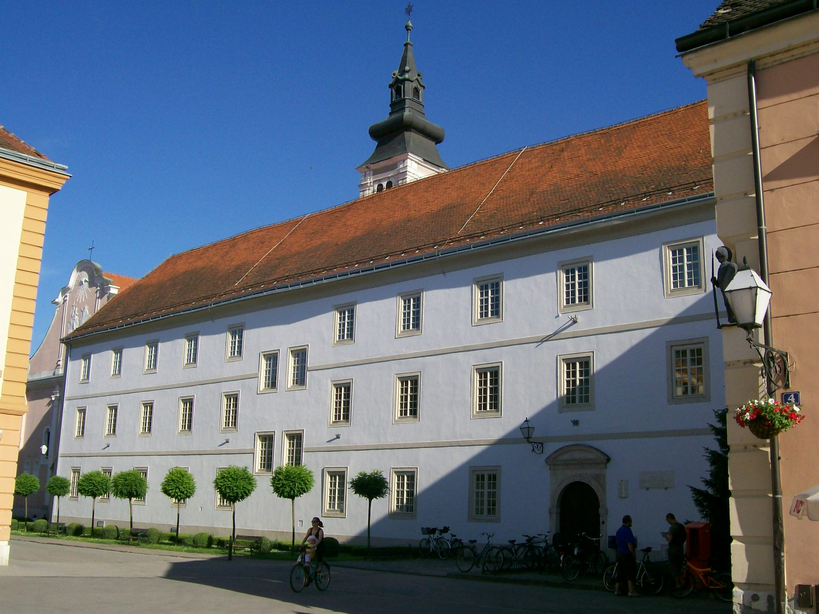 Fakultet organizacije i informatike u Varaždinu: zgrada Isusovačkog samostana